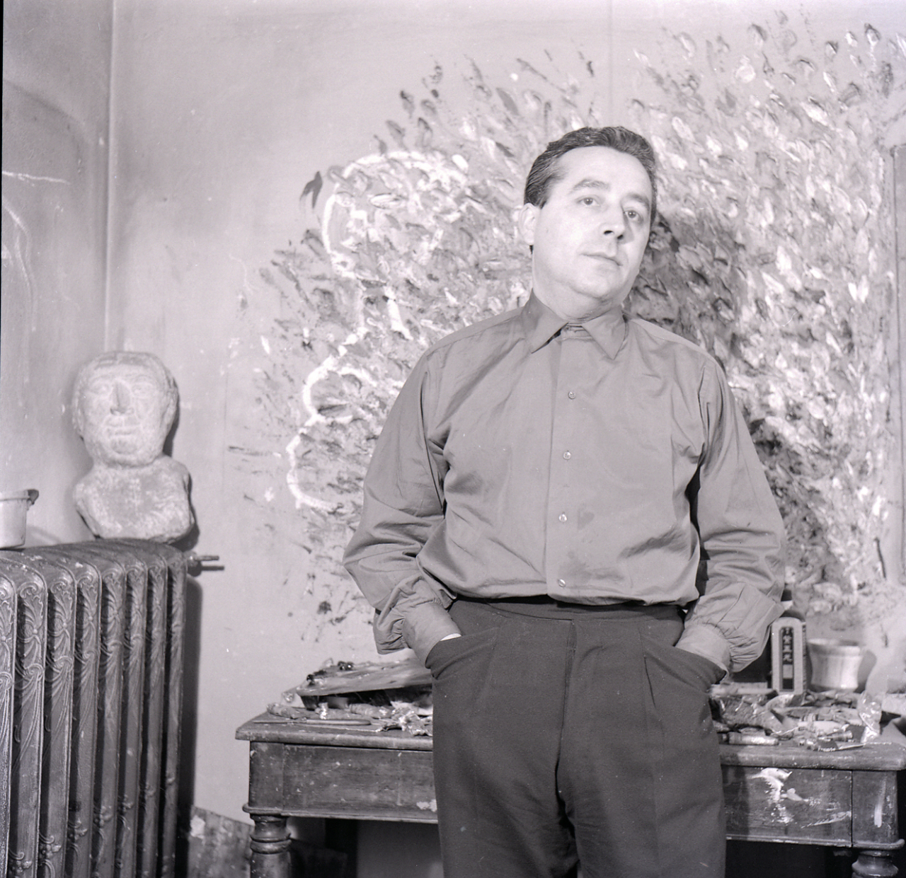 Servizio fotografico : Italia, 1982 / Paolo Monti. - Buste: 19, Fototipi: 20 : Negativo b/n, gelatina bromuro d'argento/ pellicola ; 6x6. - ((Serie costituita da 19 buste di carta, tenute insieme da una graffetta, identificate con i nn.: R4211, R4212, R4213, R4214, R4215, R4216, R4217, R4218, R4219, R4220, R4221, R4222, R4223, R4224, R4225, R4226, R4227, R4228. - Sulla busta 10206: "Cassinari"